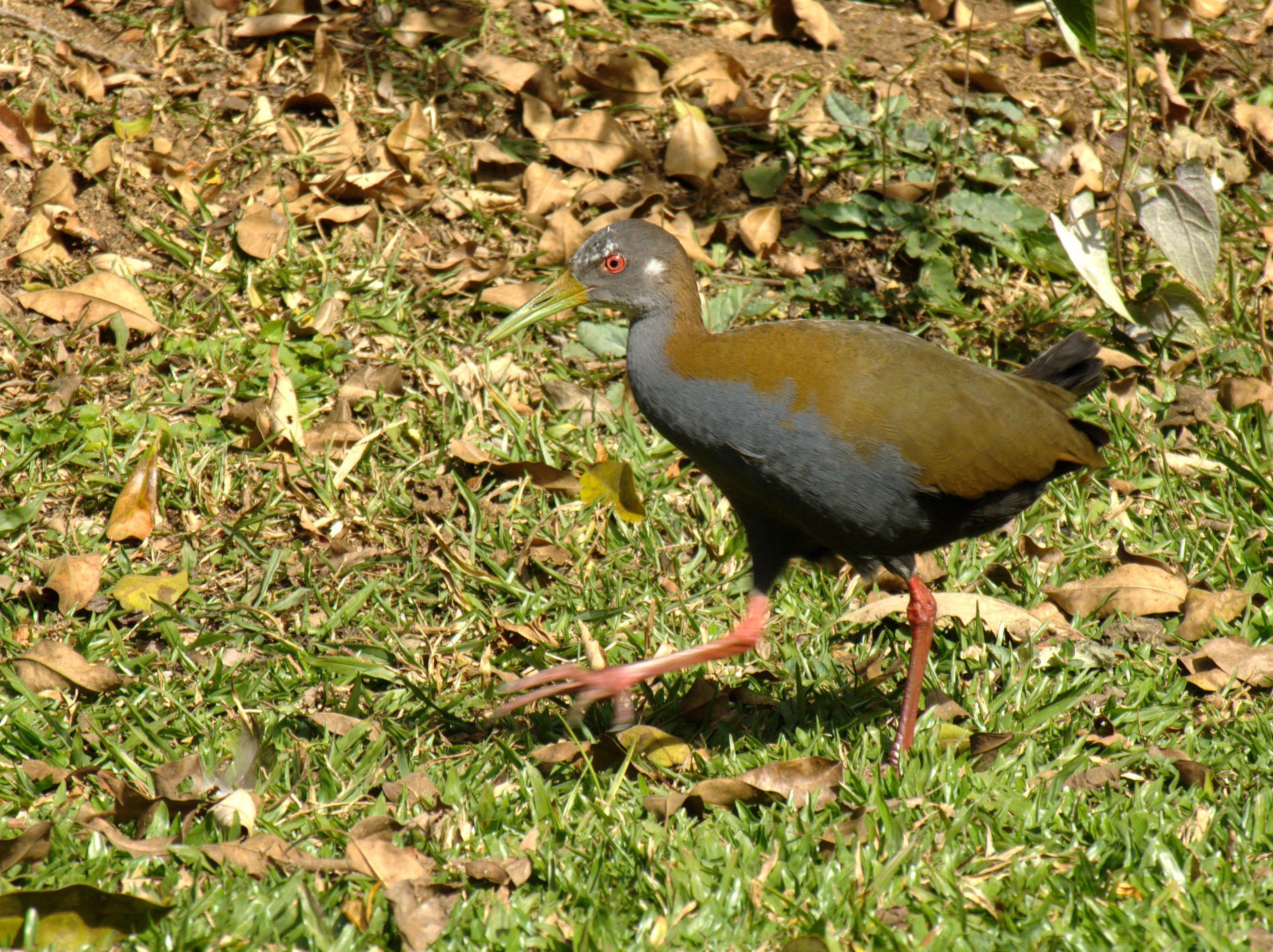 Aramides saracura (Rallidae), Curitiba, Brasil.